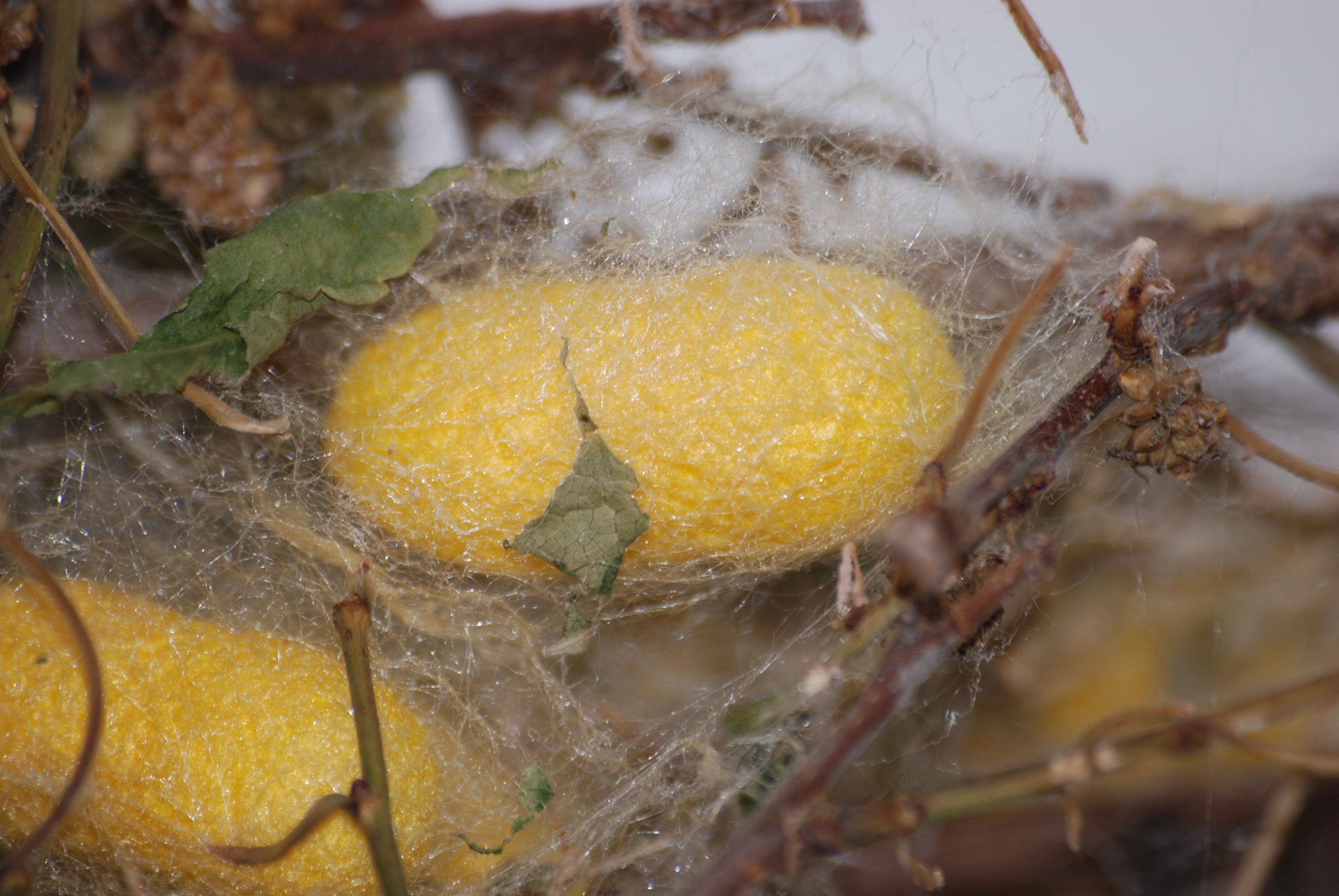 Bombyx mori (Pulpa) in Bornholms Sommerfugelpark & Tropeland